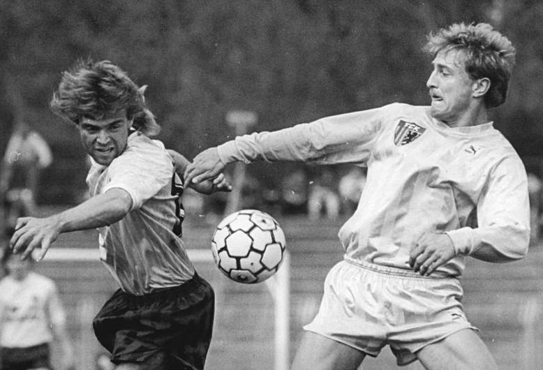 ADN-Kluge-21.4.90- Leipzig: Fußball-Oberliga 1. FC Lok Leipzig - FC Karl-Marx-Stadt 1:2 (0:0) Mit diesem Auswärtssieg haben sich die Karl-Marx-Städter in der Spitzengruppe der Tabelle behauptet. Hier ein Duell zwischen Steffen Heidrich (FCK,r) und dem Leipziger Stefan Marx.